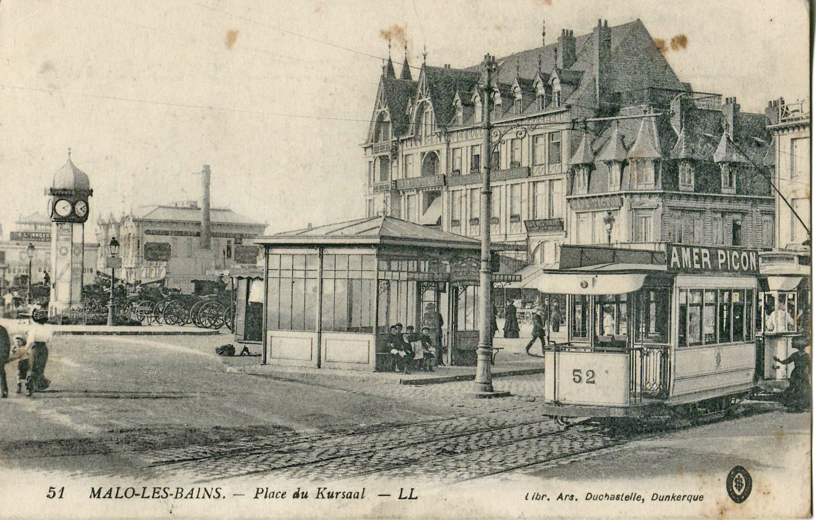 carte postale ancienne éditée par LL, n° 51 : MALO-LES-BAINS - Place du Kursaal. Vue en gros plan de la station du tramway de Dunkerque et de la remorque n°52.